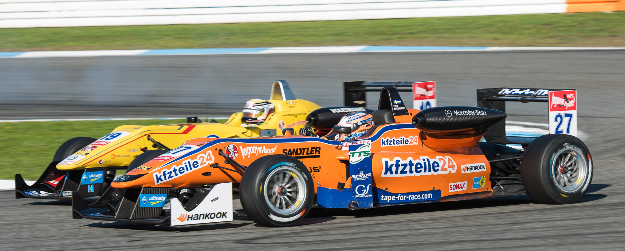 Antonio Giovinazzi,DTM,Dallara F312,Deutsche Tourenwagen Masters,F3 FIA European Championship,FIA Formel 3 Europameisterschaft,Felix Rosenqvist,Hockenheimring,Jagonya Ayam with Carlin,Mercedes-Benz,Motorsport,Mücke Motorsport,Volkswagen,kfzteile24